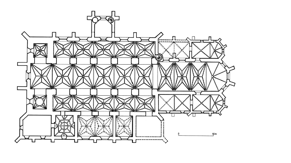 Włocławek, katedra pw. Wniebowzięcia NMP, rzut